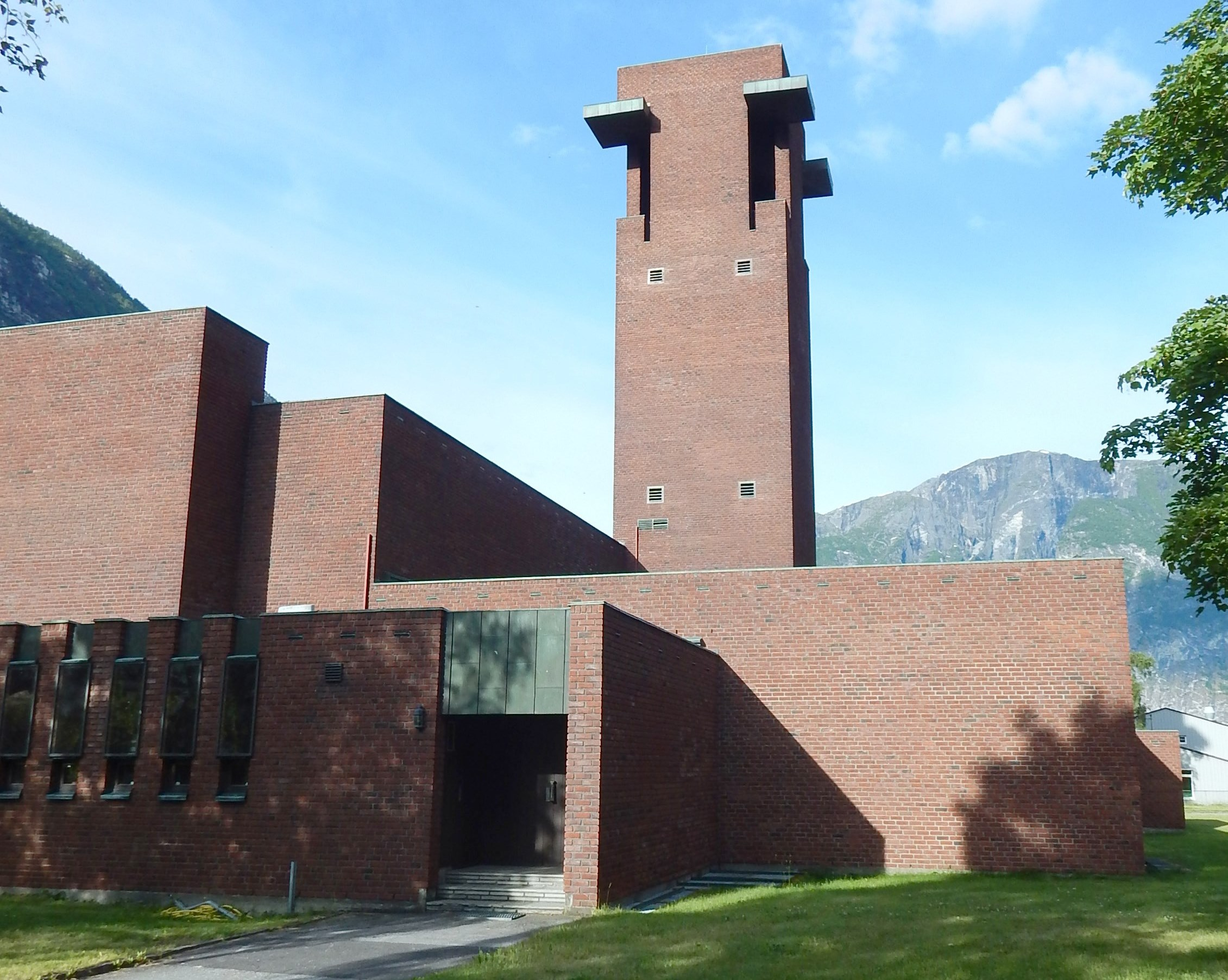 Farnes kirke i Øvre Årdal